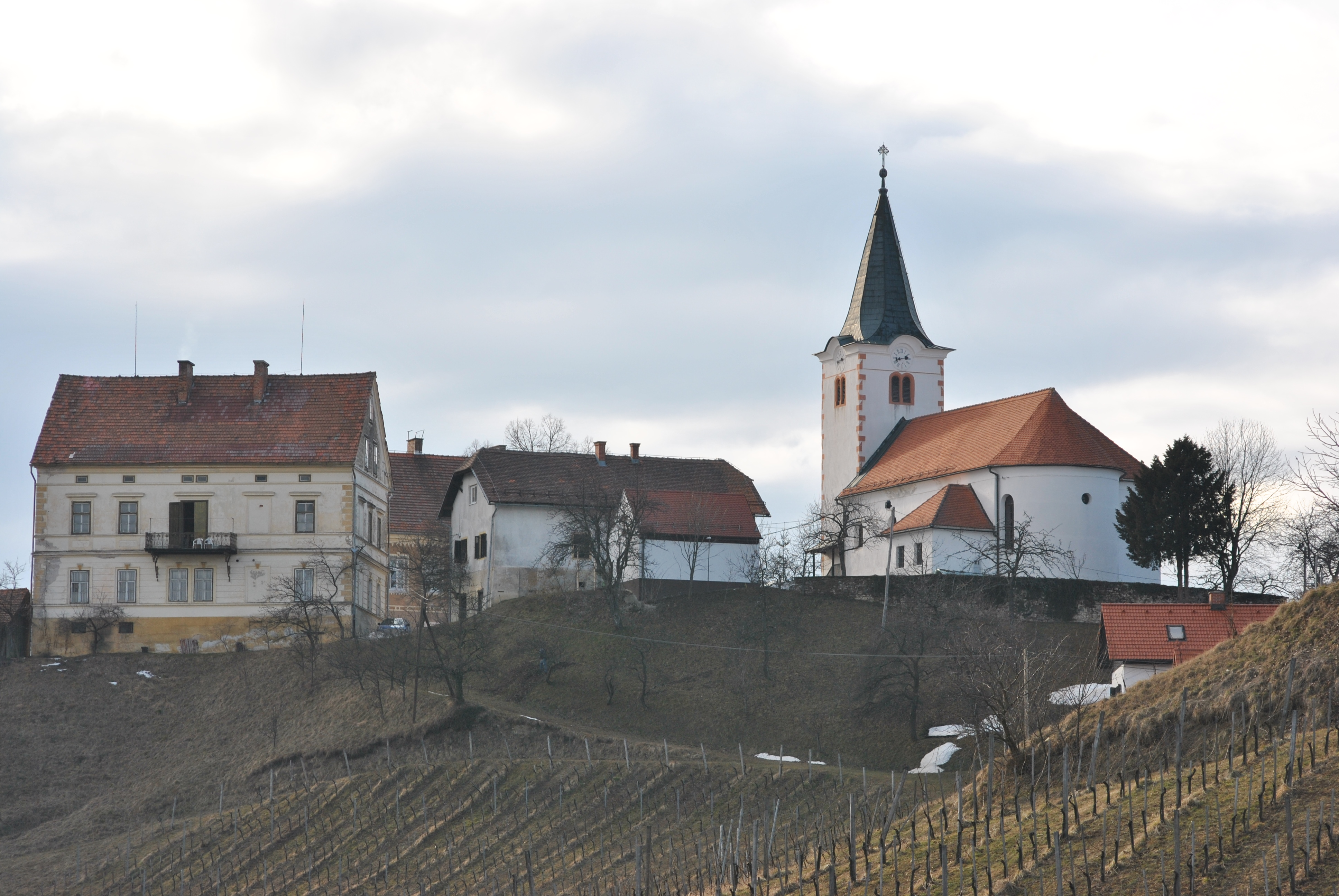 Gaj nad Mariborom . Levo zgradba nekdanje gostilne Hauptman, stanovanjska hiša in cerkev Sv. Križa